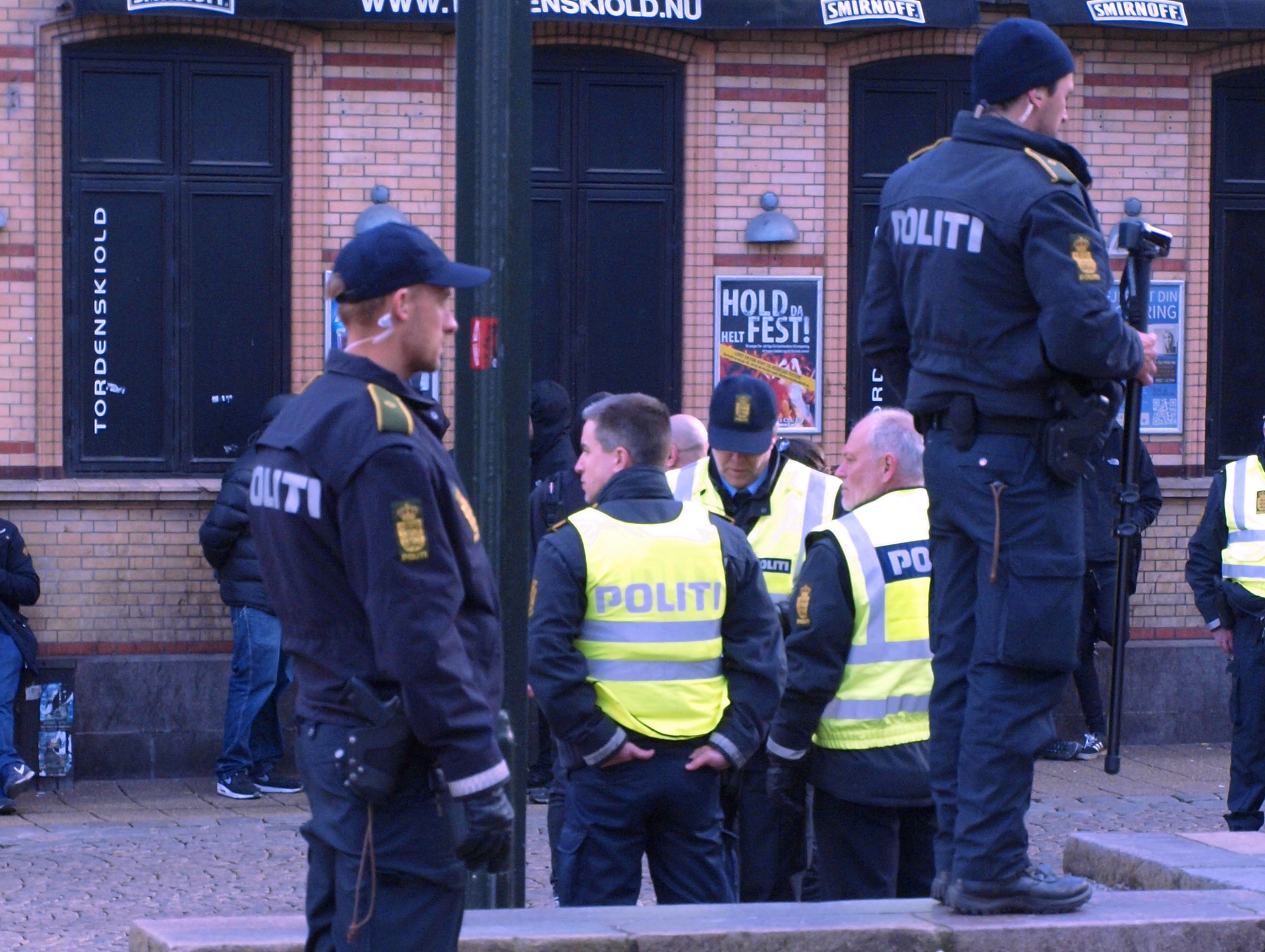 Betjent videofilmer en demonstration den 13. april 2015